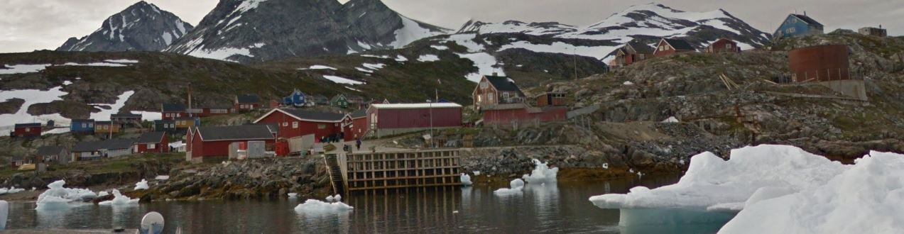 Kuummiiit